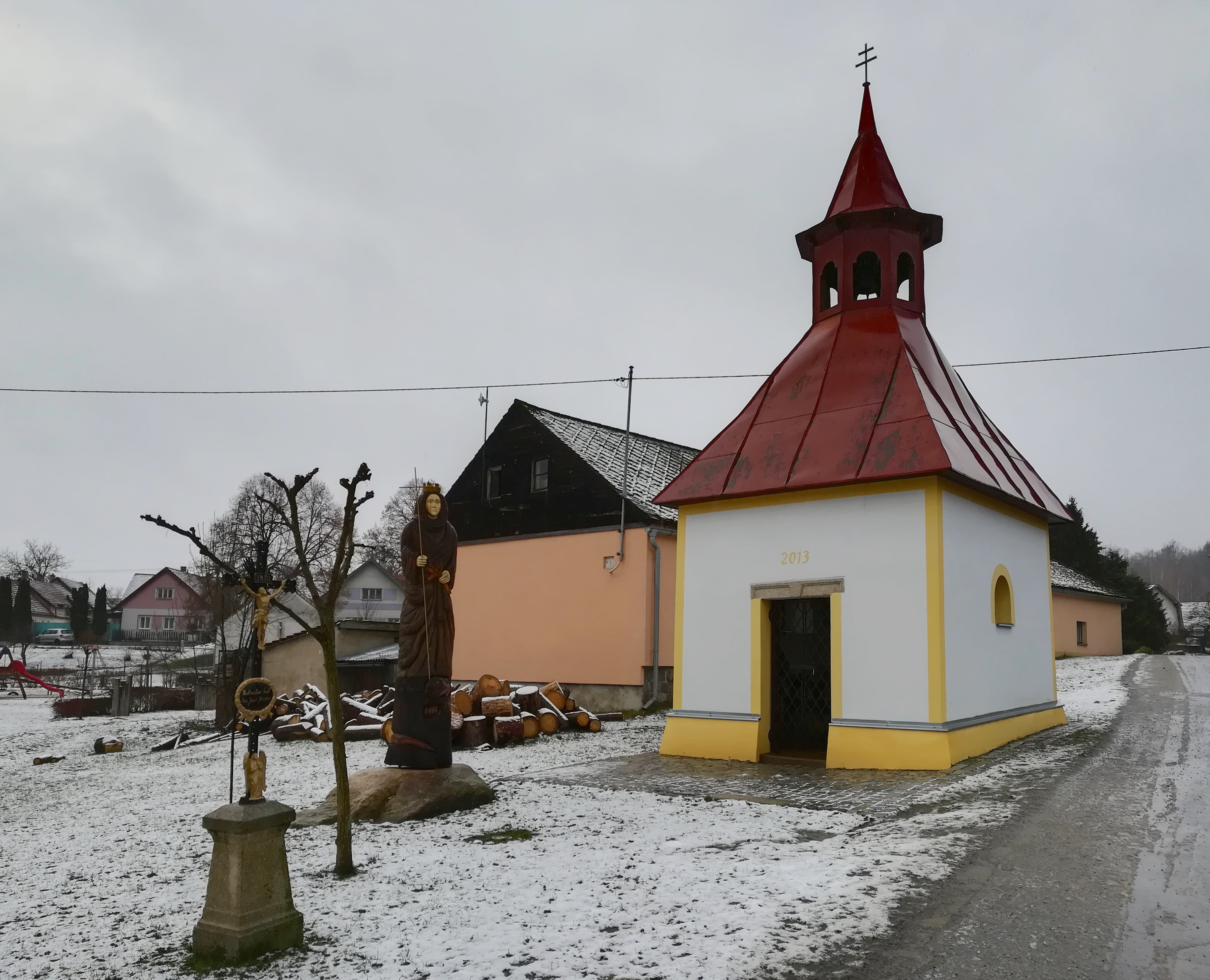 Cejle - kaple svaté Markéty na návsi